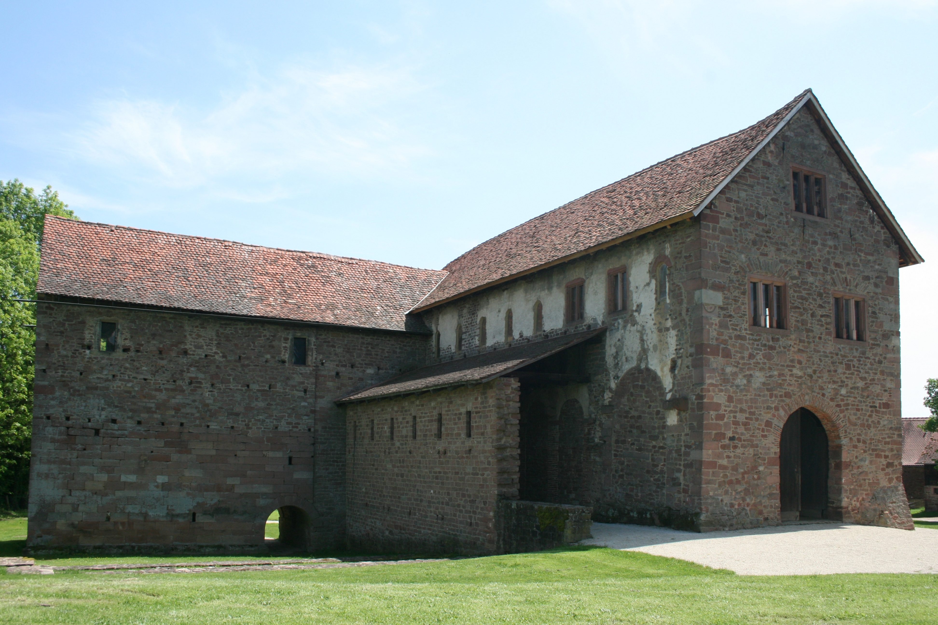 Einhardsbasilika Steinbach 2012, Ansicht von Nordwesten.